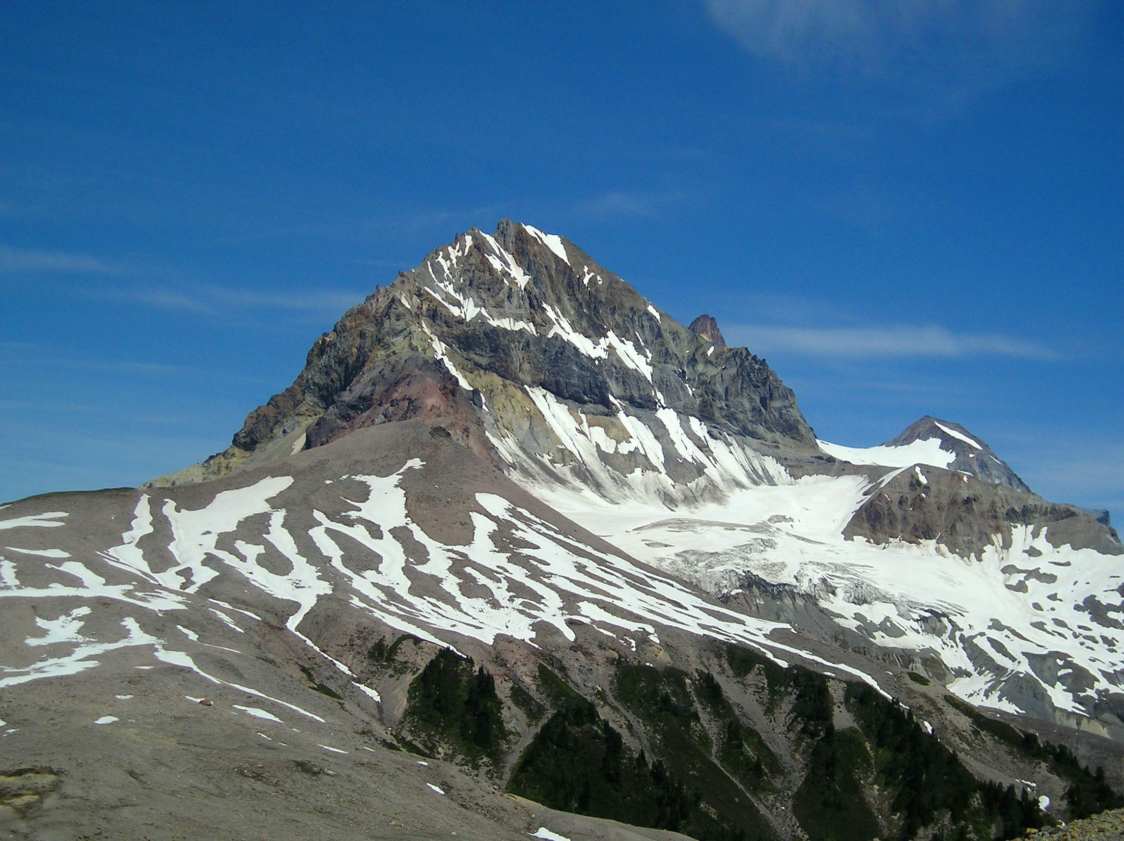 Atwell Peak. Garibaldi Provincial Park